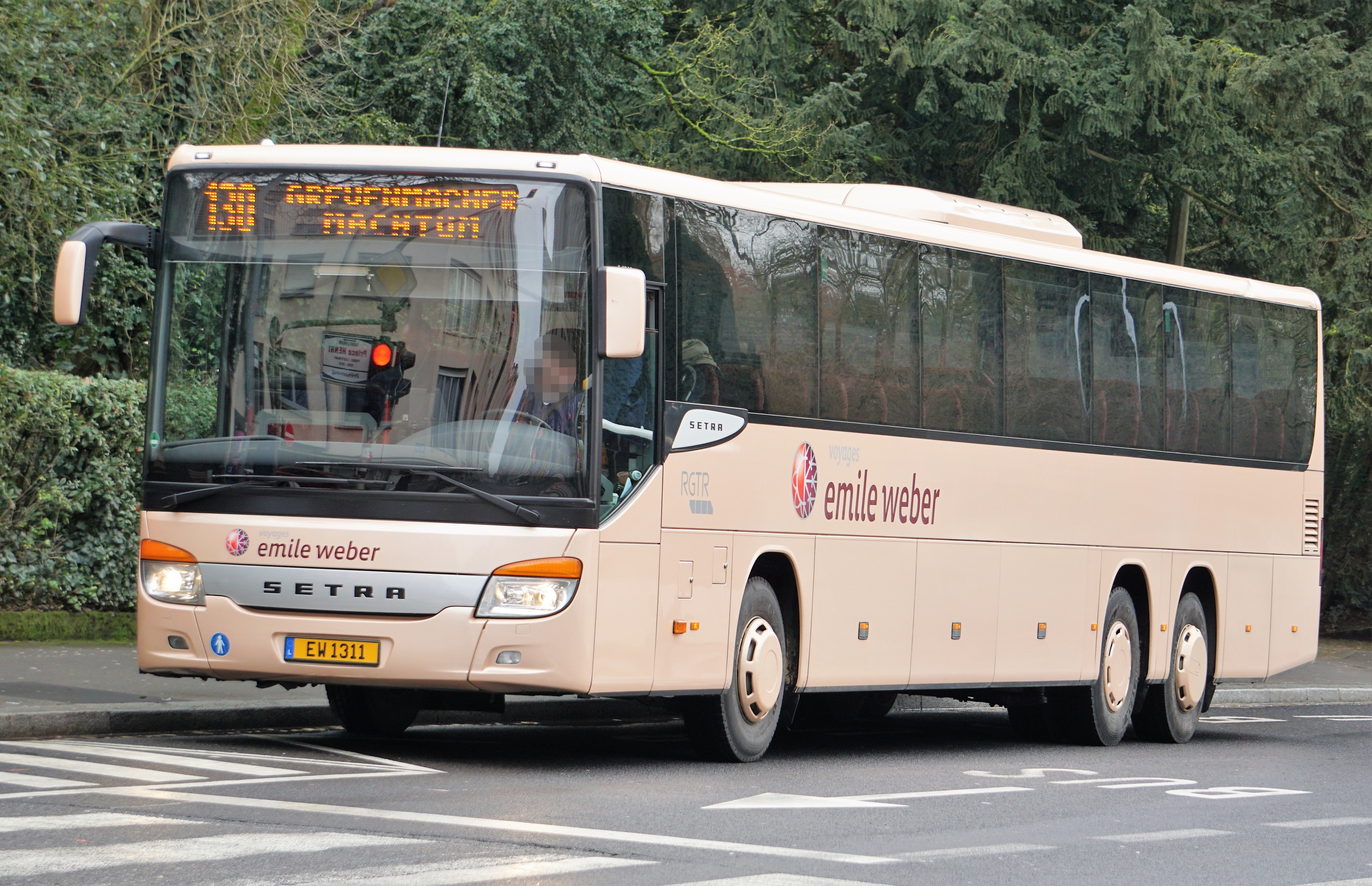 Luxembourg, avenue Emile-Reuter arrêt Charlys Gare, EW1311, Emile Weber, ligne 130 direction Machtum.